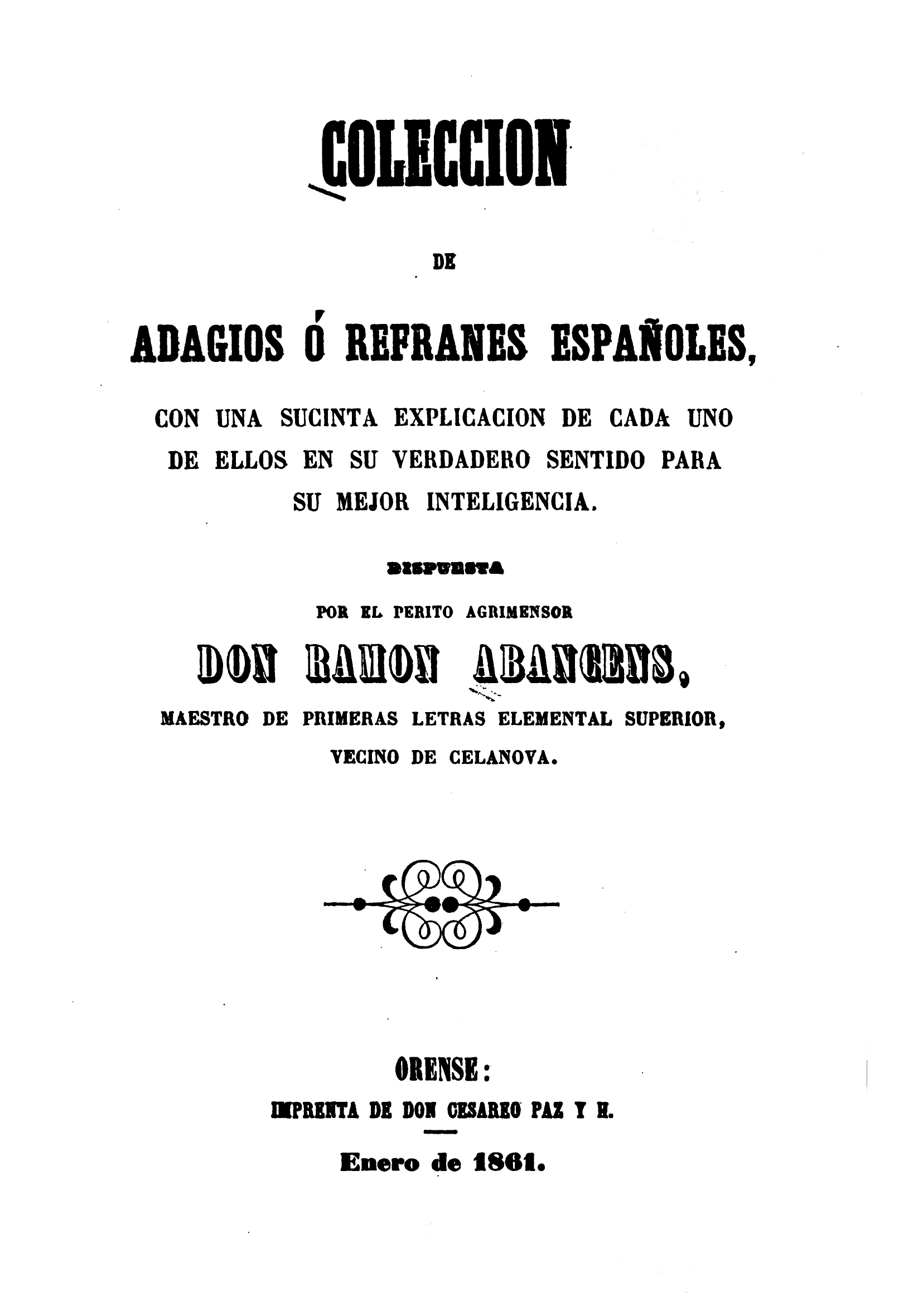 Portada facsímile da obra Colección de adagios ó refranes españoles, con una sucinta explicación de cada uno de ellos en su verdadero sentido para su mejor inteligencia (1861), de Ramón Abancéns, co seguinte texto: COLECCIONDEADAGIOS Ó REFRANES ESPAÑOLES,CON UNA SUCINTA EXPLICACION DE CADA UNODE ELLOS EN SU VERDADERO SENTIDO PARASU MEJOR INTELIGENCIA.DISPUESTAPOR EL PERITO AGRIMENSORRAMON ABANCENS,MAESTRO DE PRIMERAS LETRAS ELEMENTAL SUPERIOR,VECINO DE CELANOVA.ORENSE:IMPRENTA DE DON CESAREO PAZ Y H.---Enero de 1861.